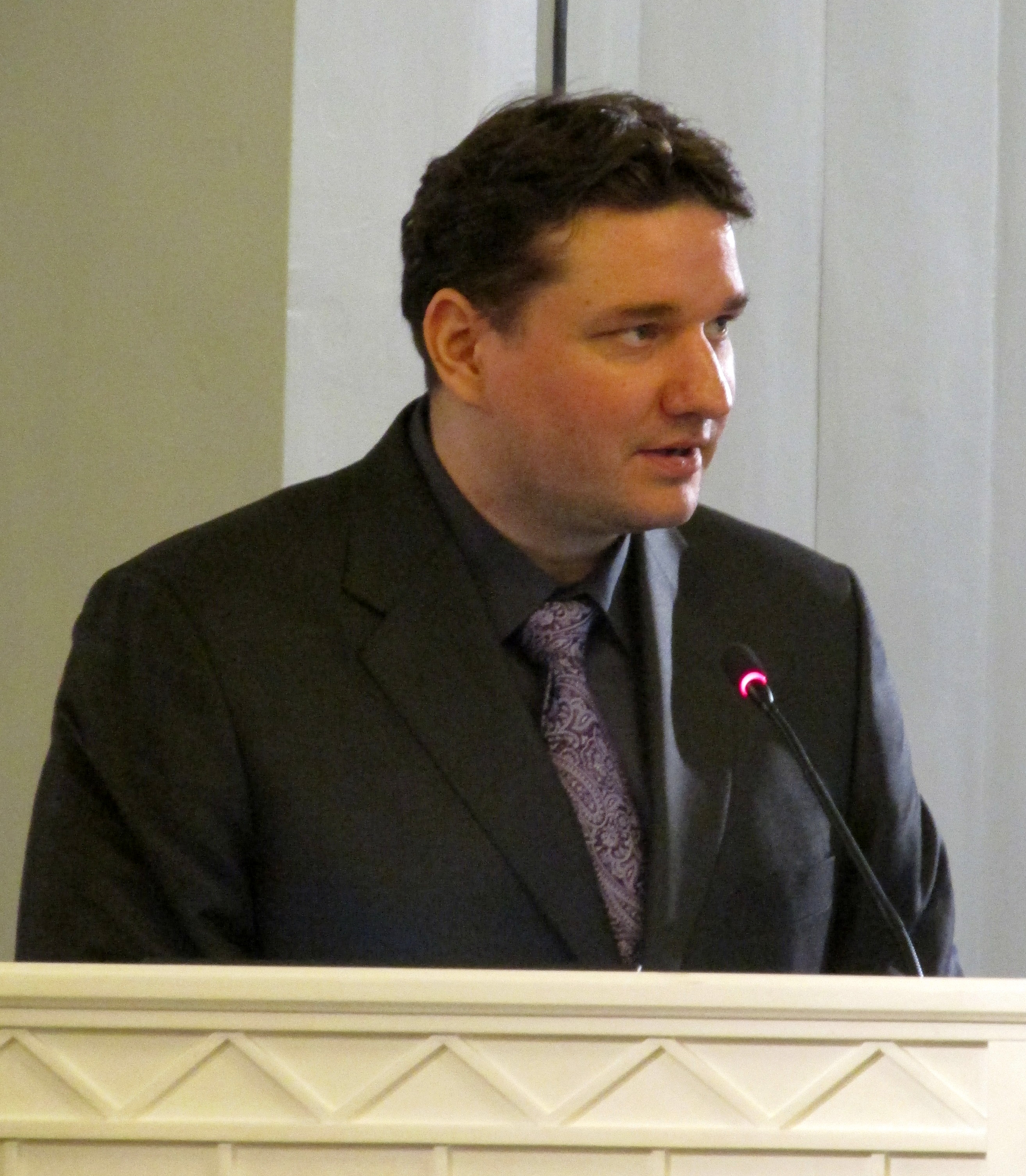 Filosoofiaõppejõud Bruno Mölder seminaril „Rahvusvahelised rahvusteadused rahvusülikoolis”.